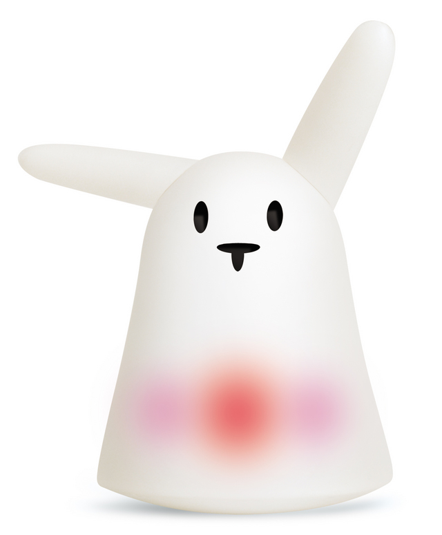 Nabaztag le premier lapin communiquant